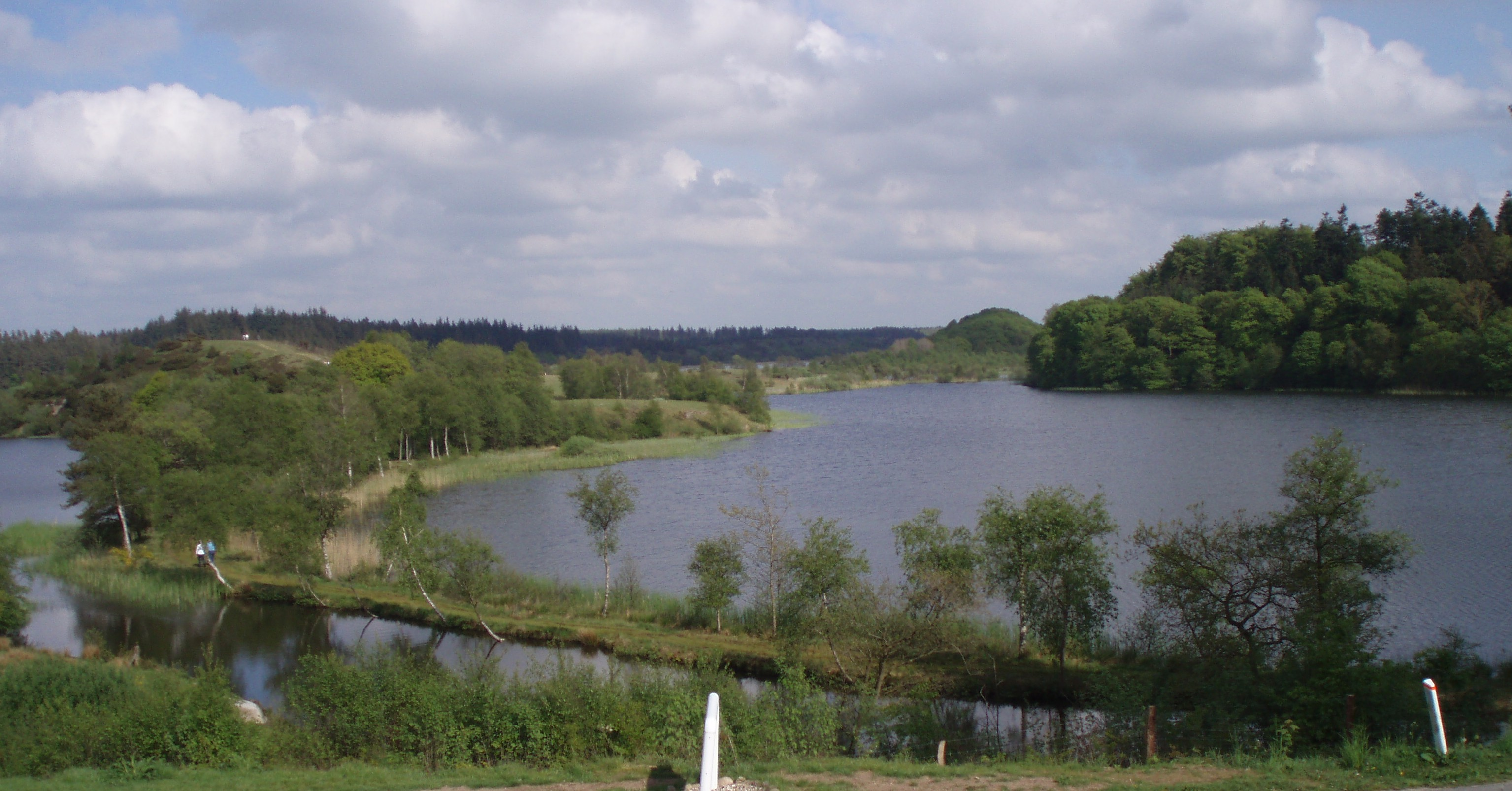 Rørbæk Sø in Jutland, Denmark